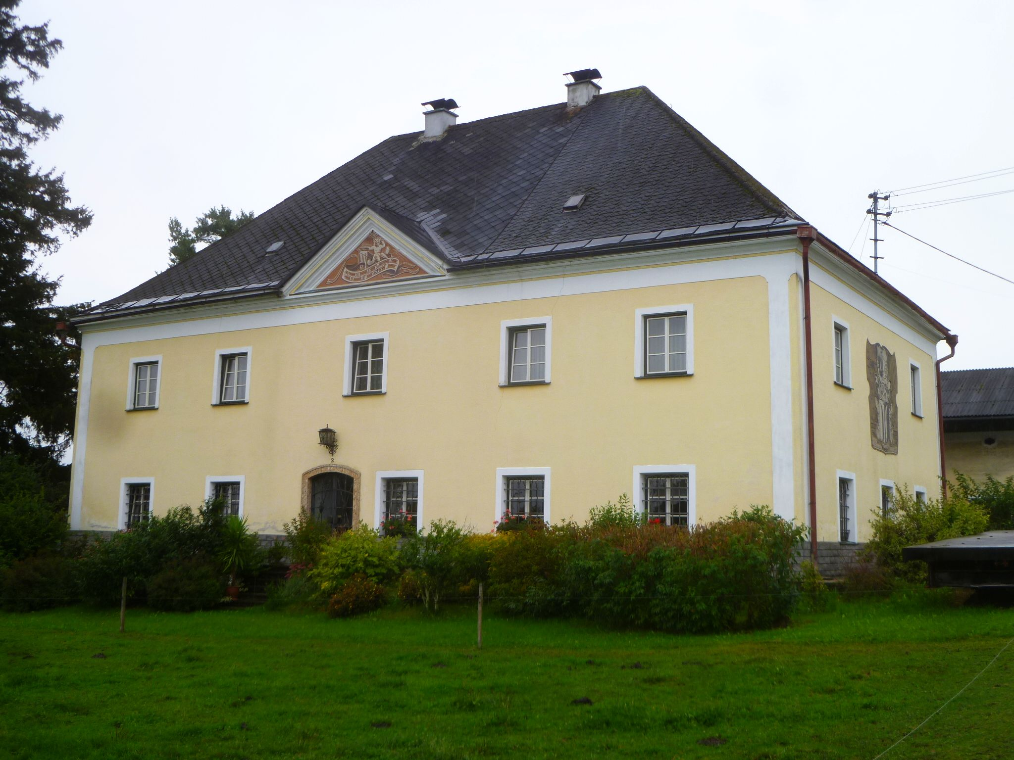 Schloss Katzenberg heute